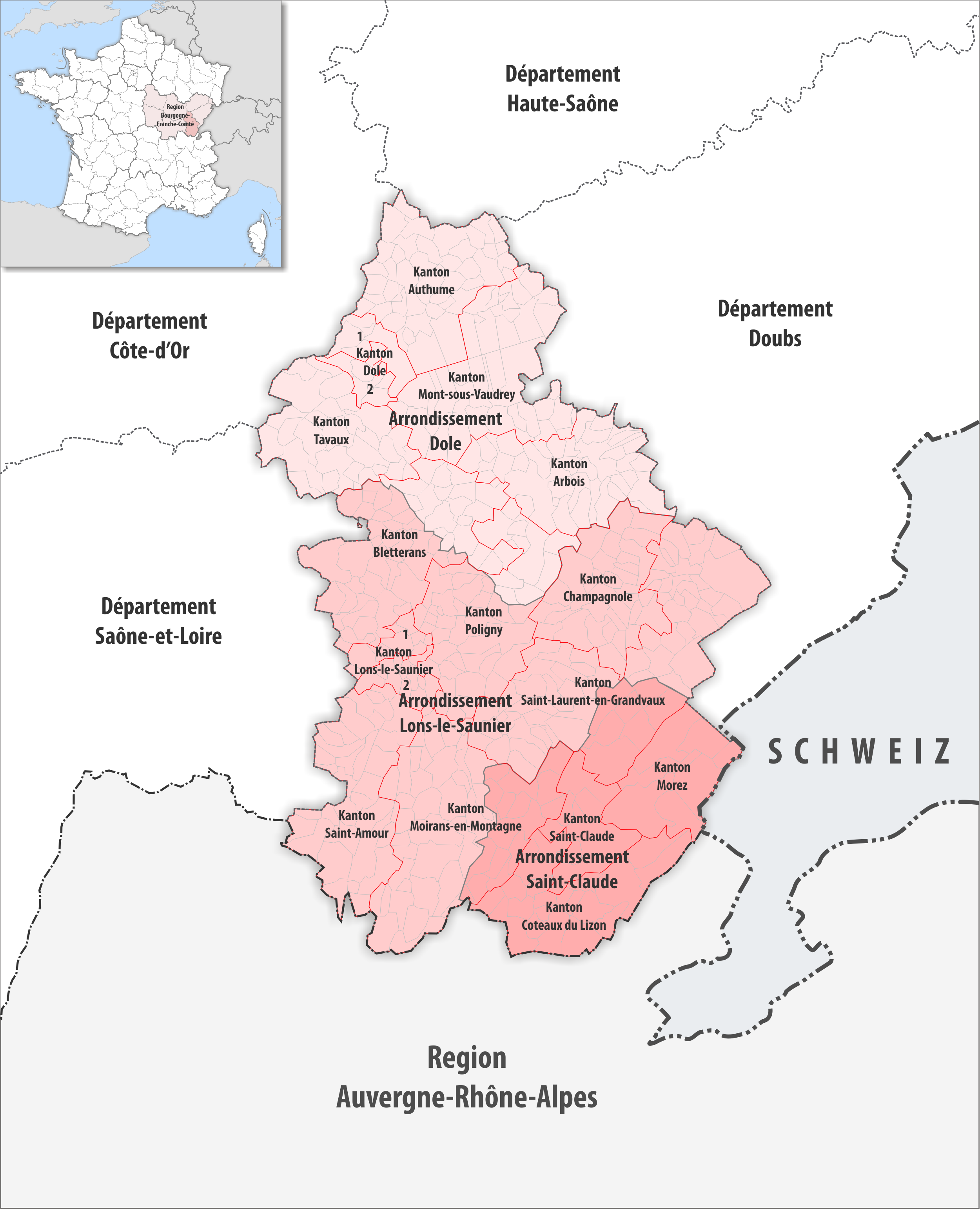 Gemeinden, Kantone und Arrondissemente im Departement Jura